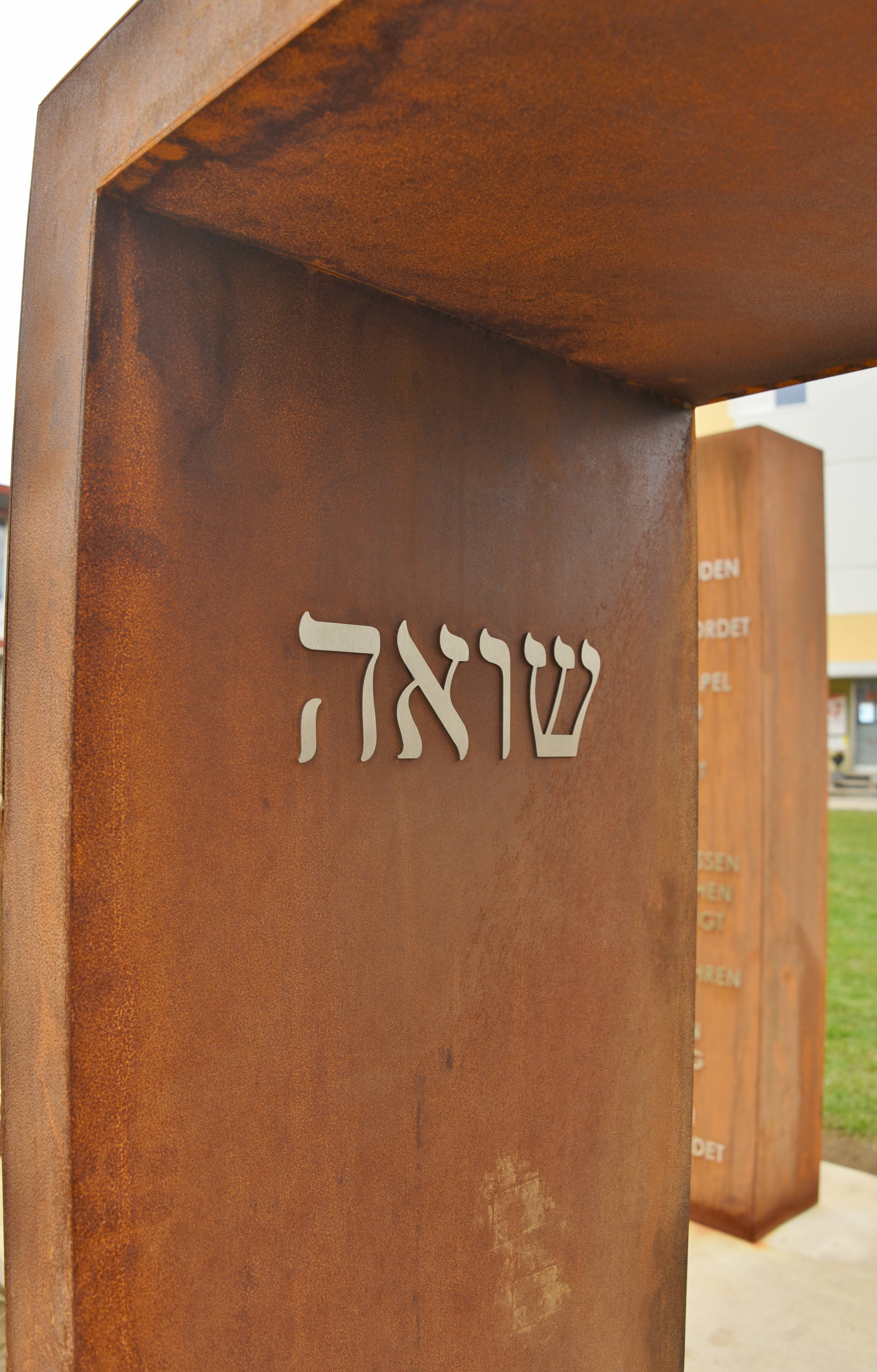 Detail